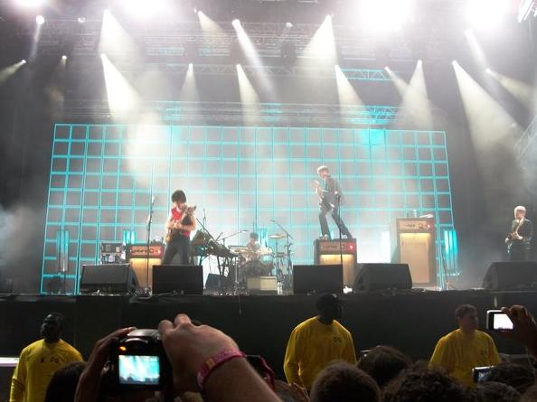 Concierto Franz Ferdinand SOS 4.8